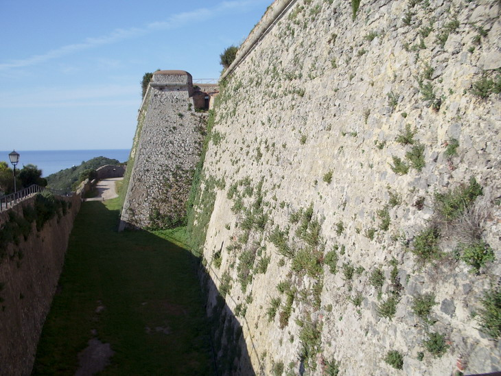 Bastione ovest Rocca aldobrandesca Porto Ercole